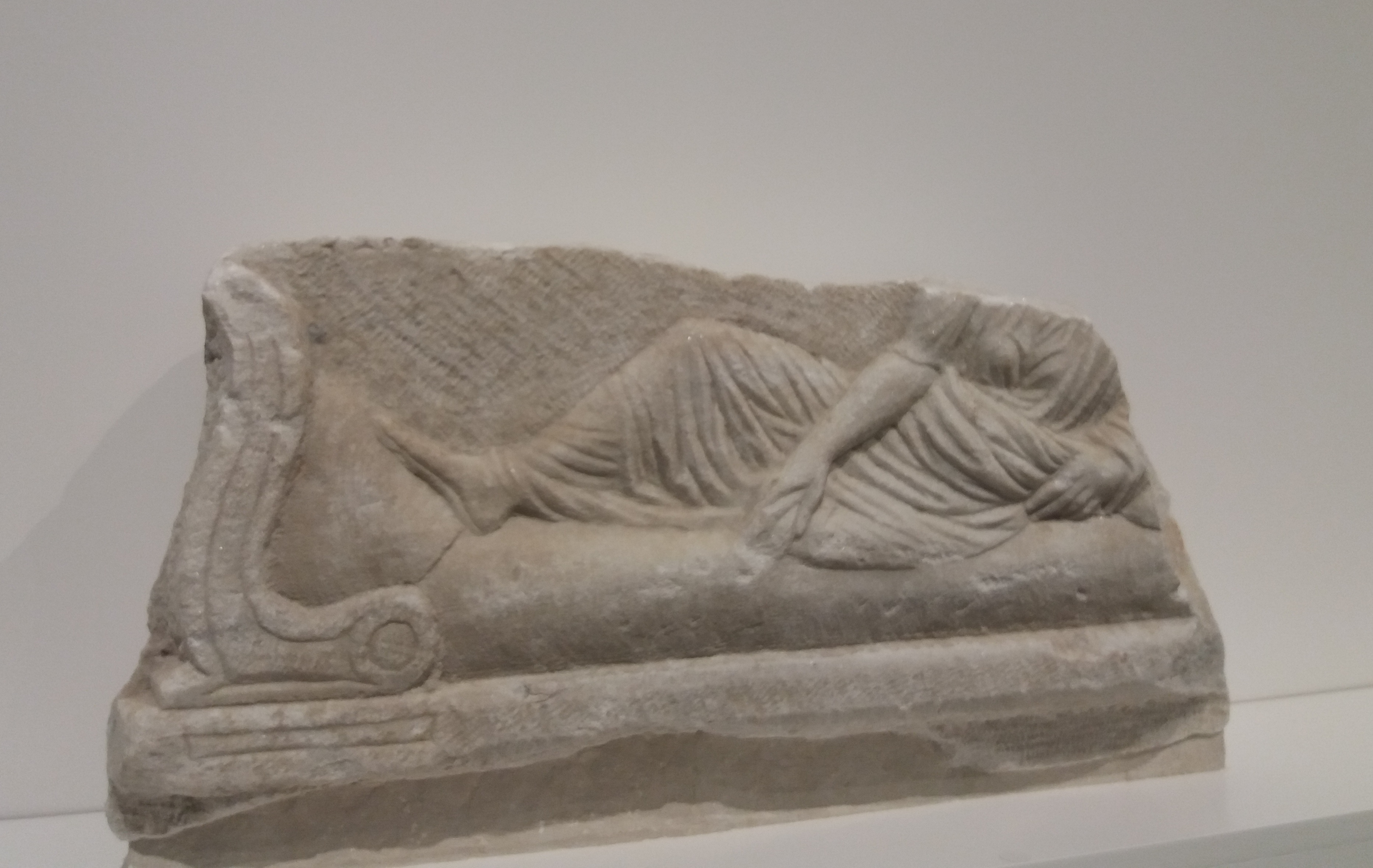 музей-заповедник "Херсонес Таврический"